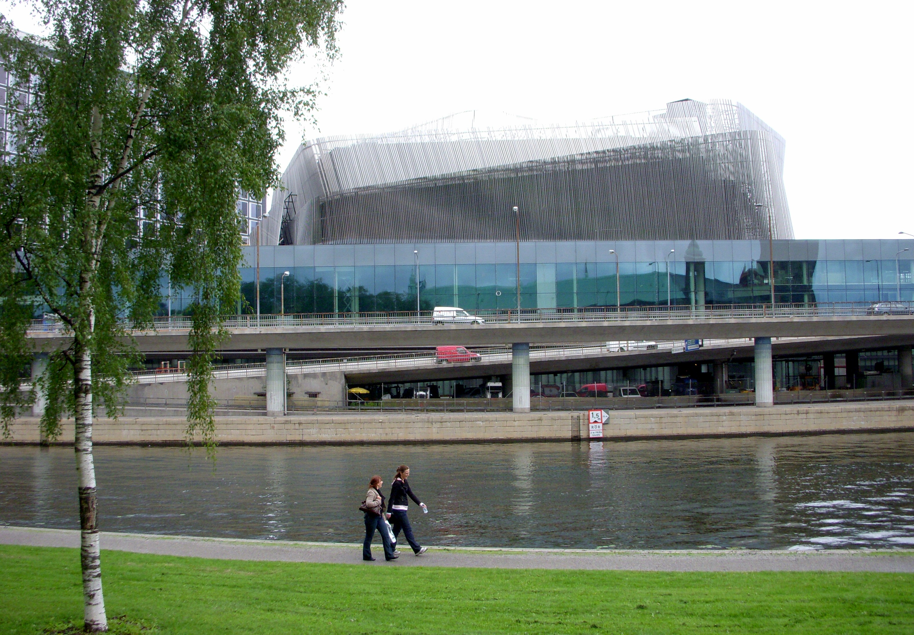 Waterfront building i Stockholm, kongressdelen